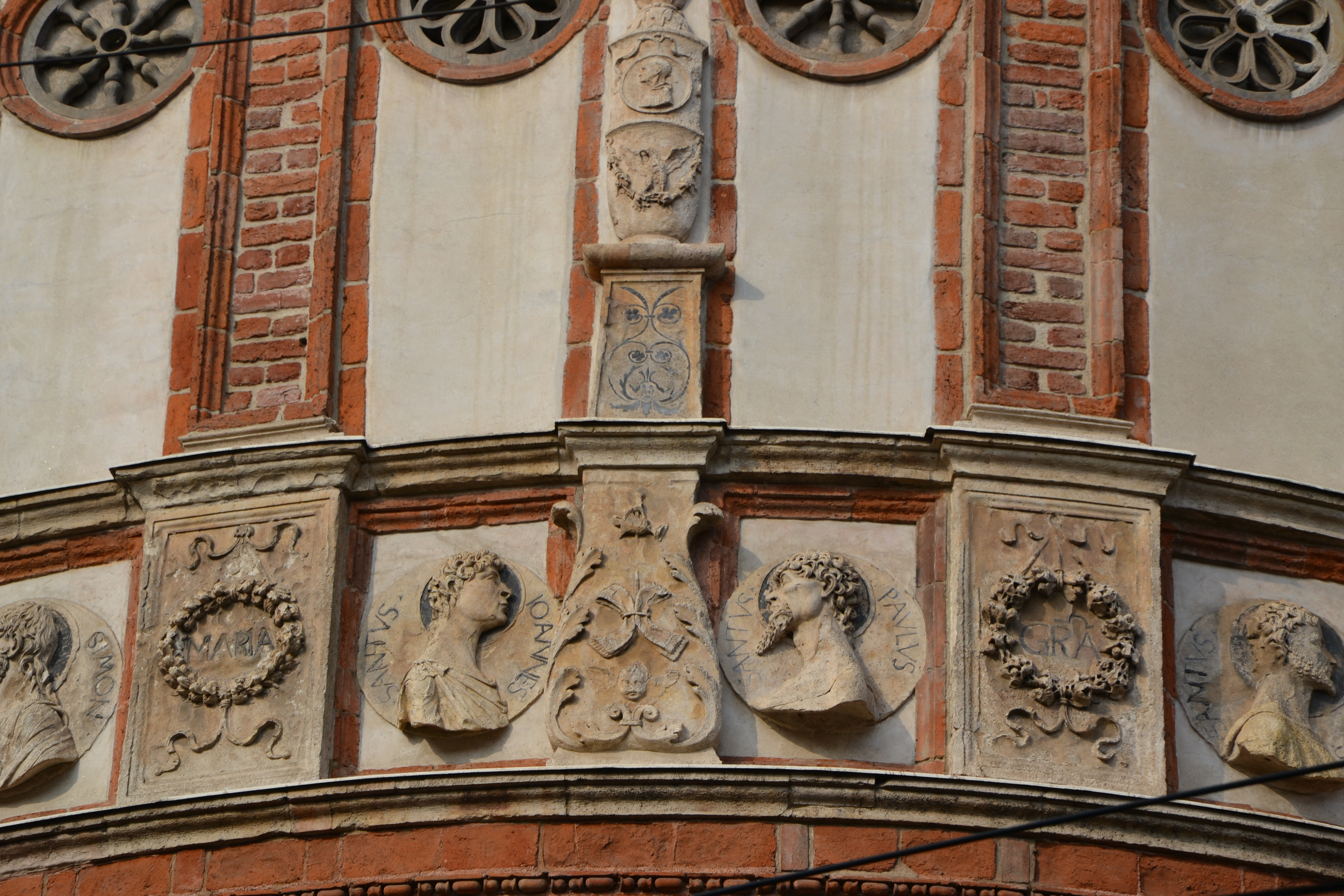 Santa Maria delle Grazie (Milan) - Apse exterior